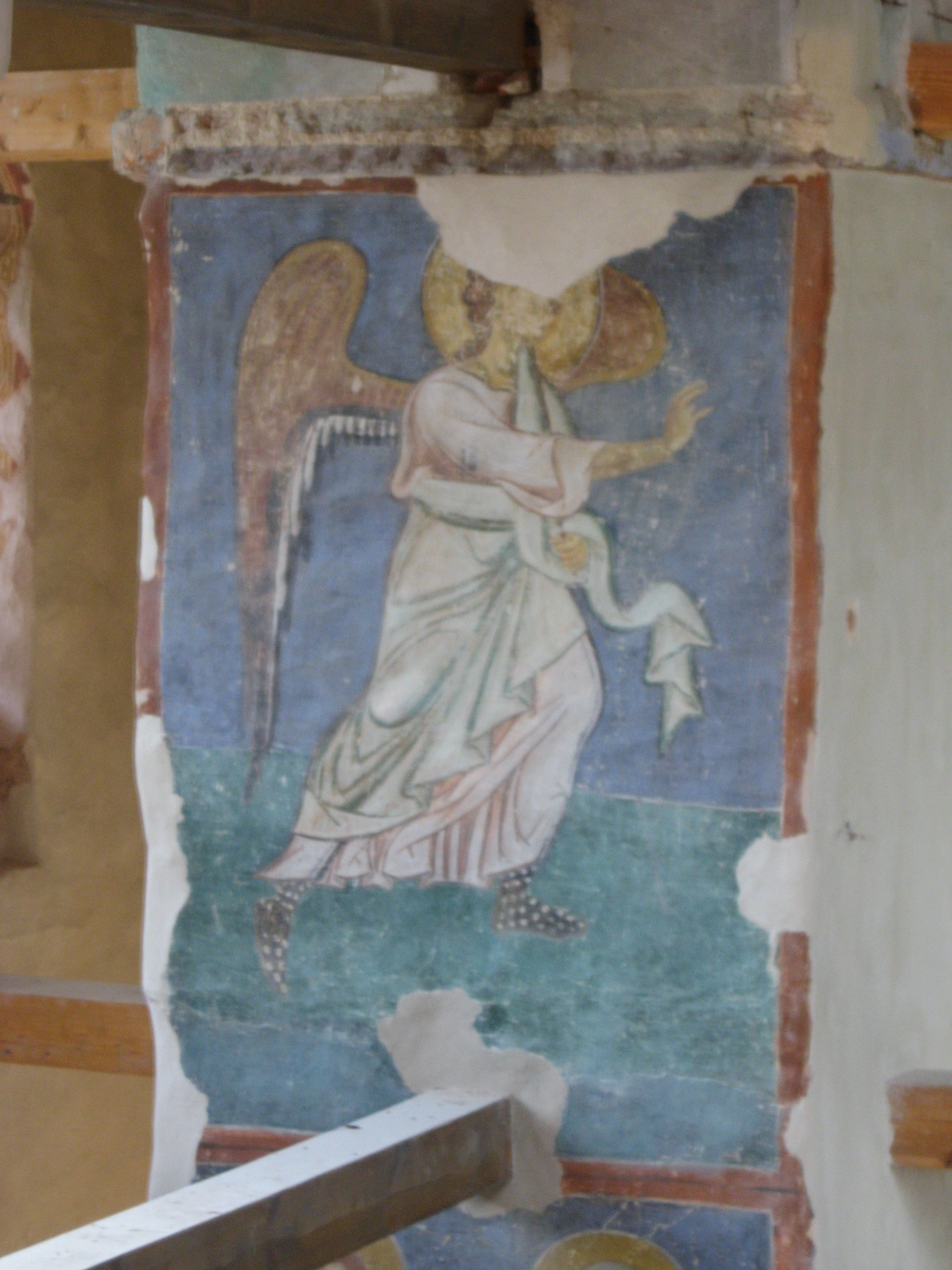 Архангел Гавриил. Фреска собора Антониева монастыря. 1125 год.